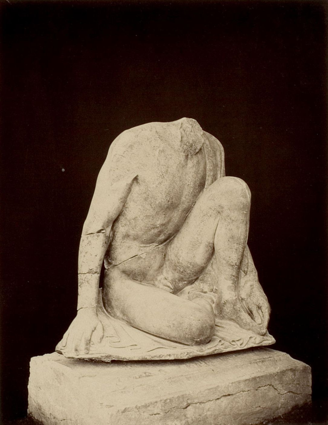 Kauernder Knabe aus dem Ostgiebel des Zeus-Tempels von Olympia, gefunden in mehreren Stücken am 23. und 27. December 1875 vor der Ostfront (s. zu Tafel VII). H. 1,00 M. Breite der Schultern: 0,60 M.